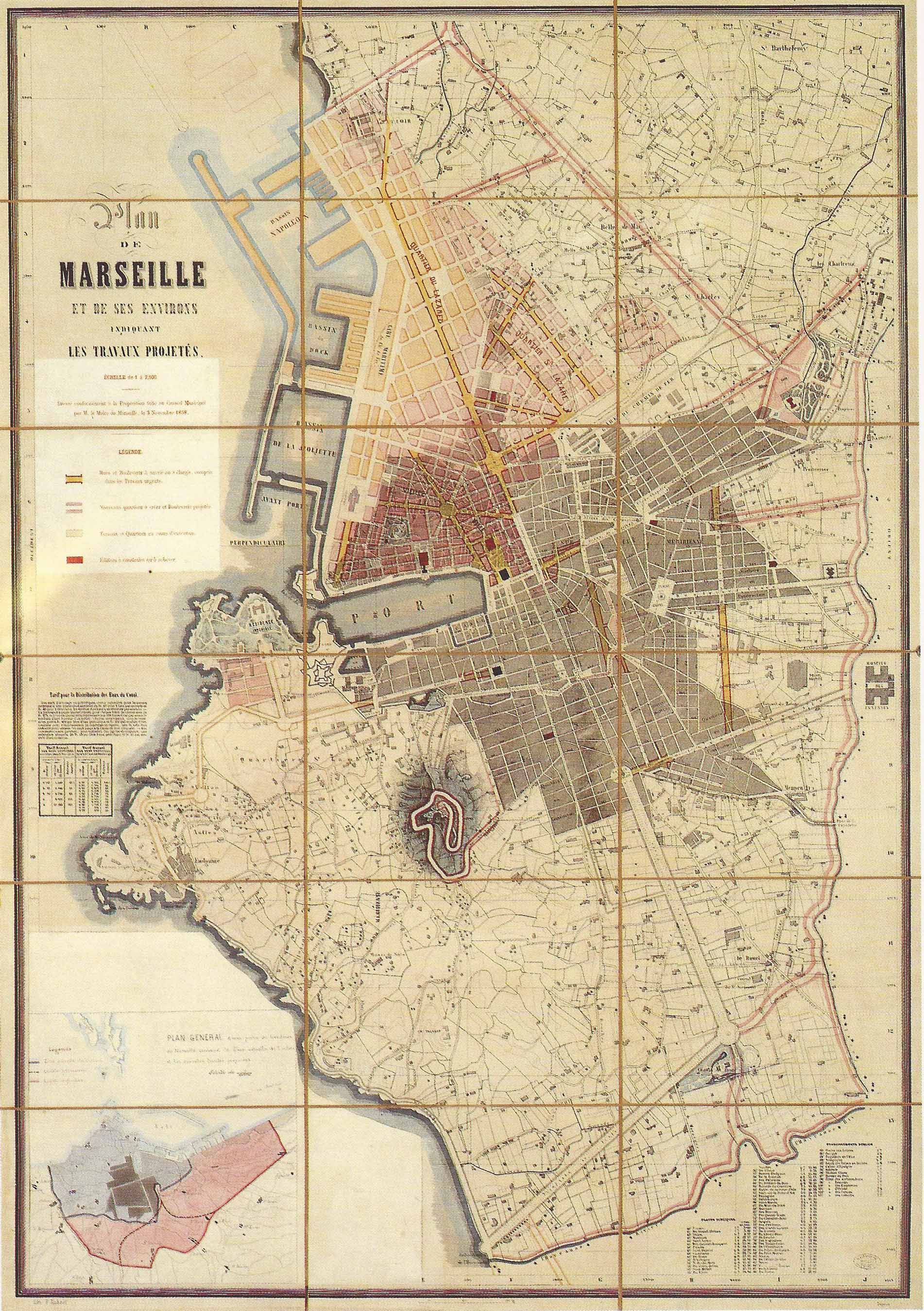 Plans de 1839 avec programme de 1858